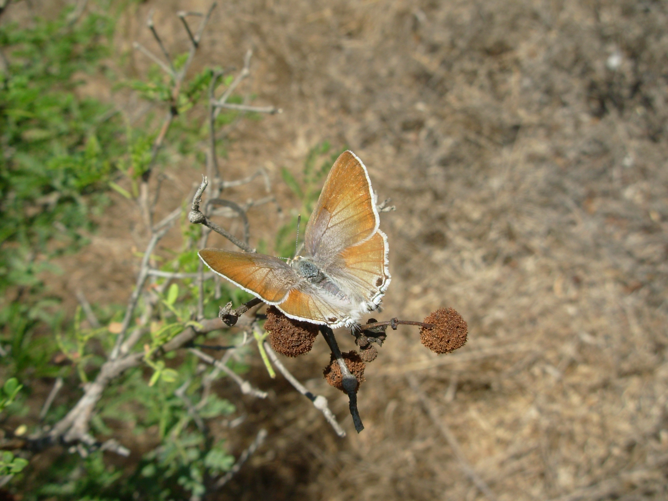 כחליל הרימון צולם בגבעה הצרפתית בספטמבר 2011